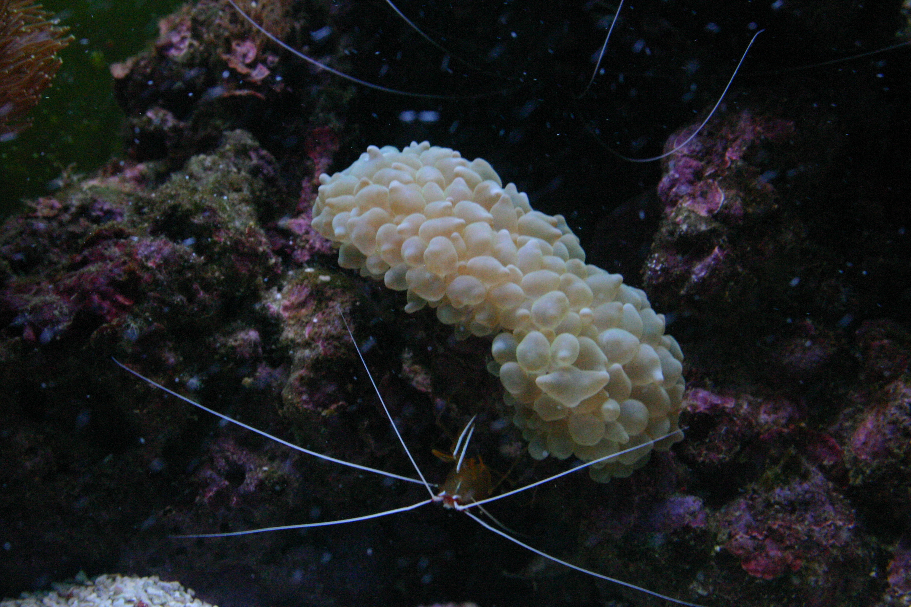 Physogyra lichtensteini y Lysmata amboinensis en acuario de arrecife